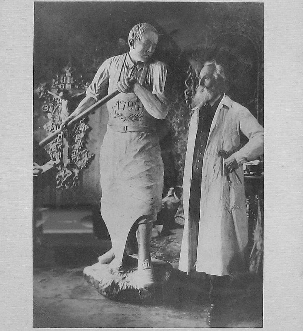 Der Bildhauer Johann Koller (*1838 in Erasbach – †1920 in Neumarkt) mit seiner 1916 geschaffenen Holzstatue des Neumarkter Torschmieds Veit Jung / Photo aus dem Stadtarchiv Neumarkt